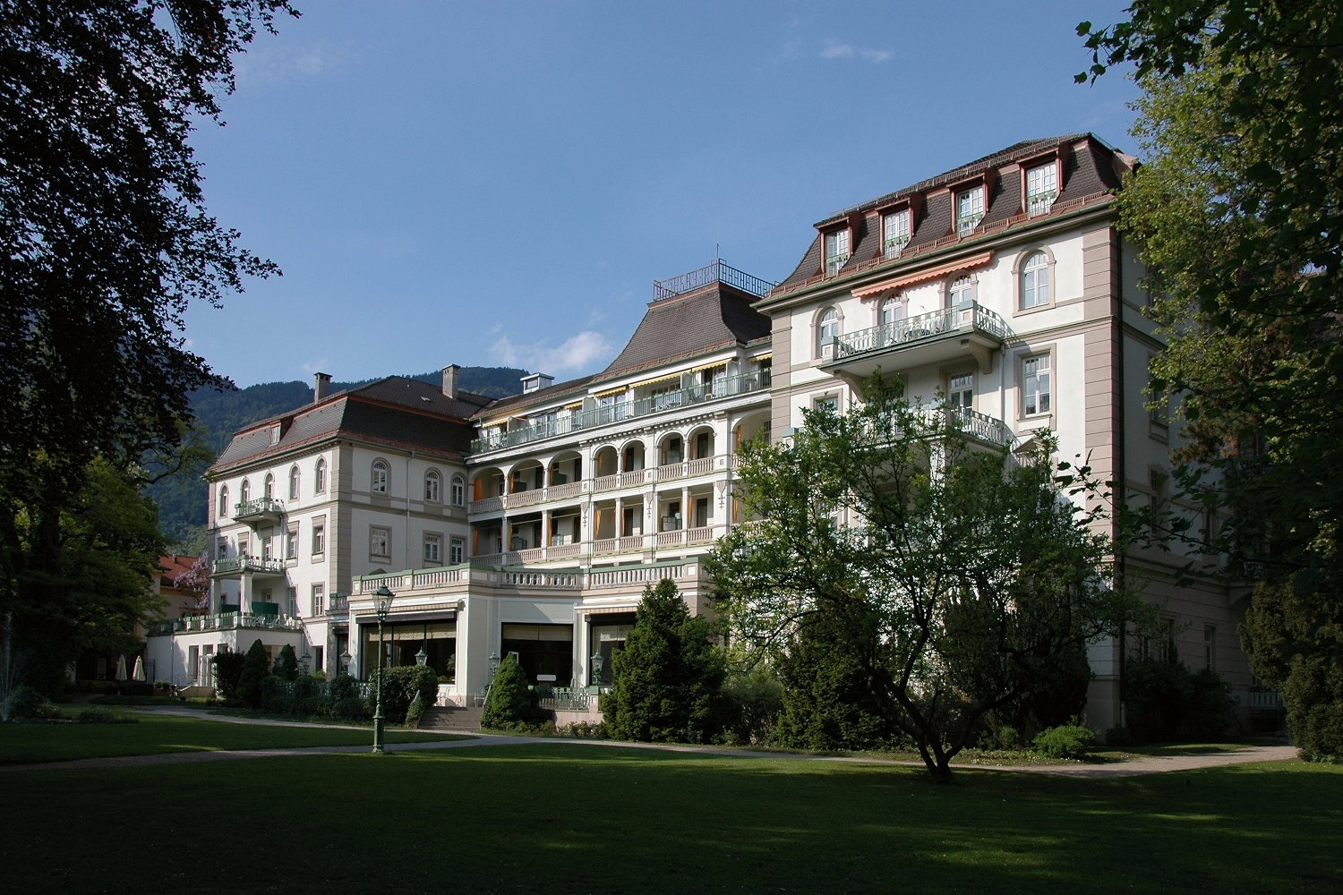 Axelmannstein Hotel Bad Reichenhall. Das Hotel wird derzeit (August 2017) als "Wyndham Grand Bad Reichenhall" betrieben.